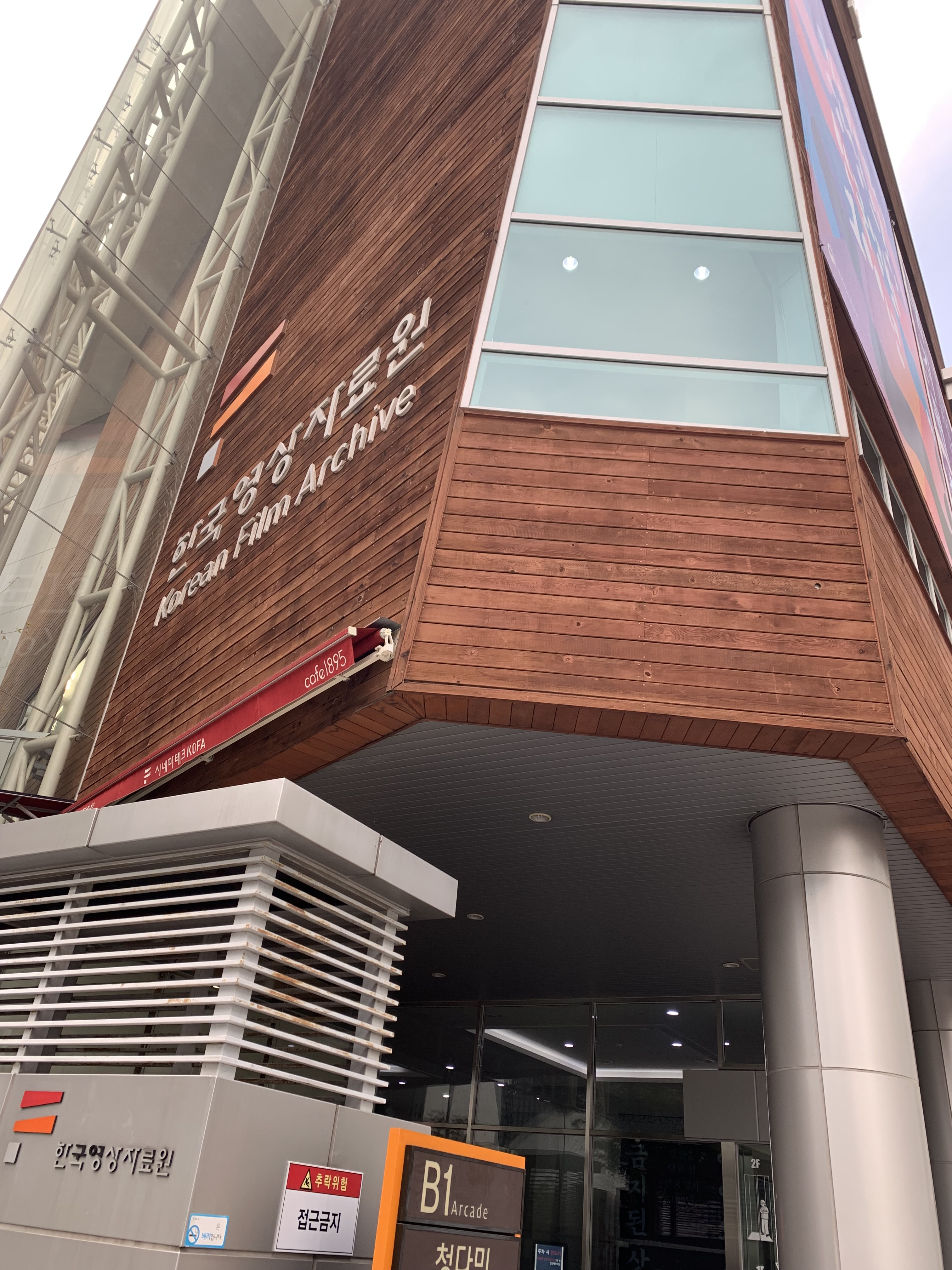 한국영상자료원 입구